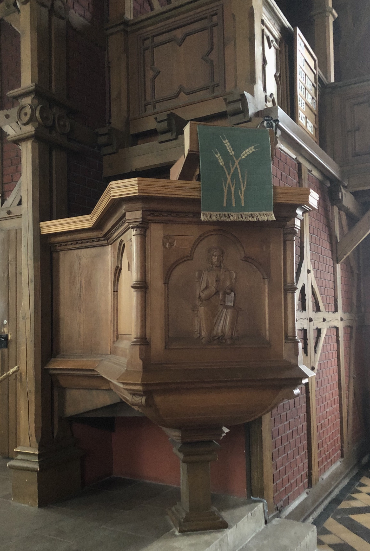 Kanzel Trinitatiskirche Braunlage